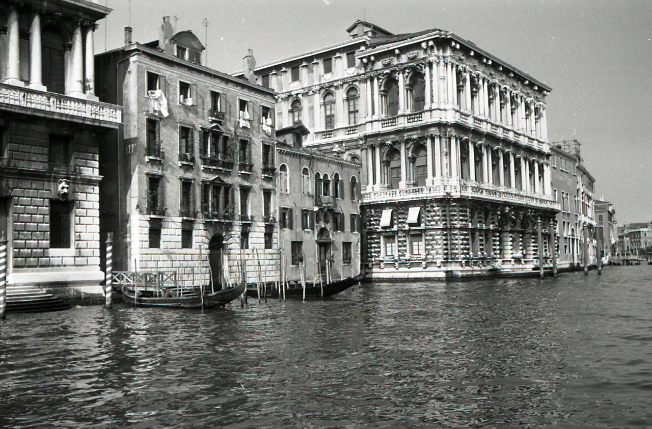 Serie fotografica : Venezia, 1966 / Paolo Monti. - Strisce: 1, Fotogrammi complessivi: 4 : Negativo b/n, gelatina bromuro d'argento/ pellicola ; 35 mm. - ((I fotogrammi hanno una doppia numerazione. - Sul portanegativi: Leica V- Adox 17